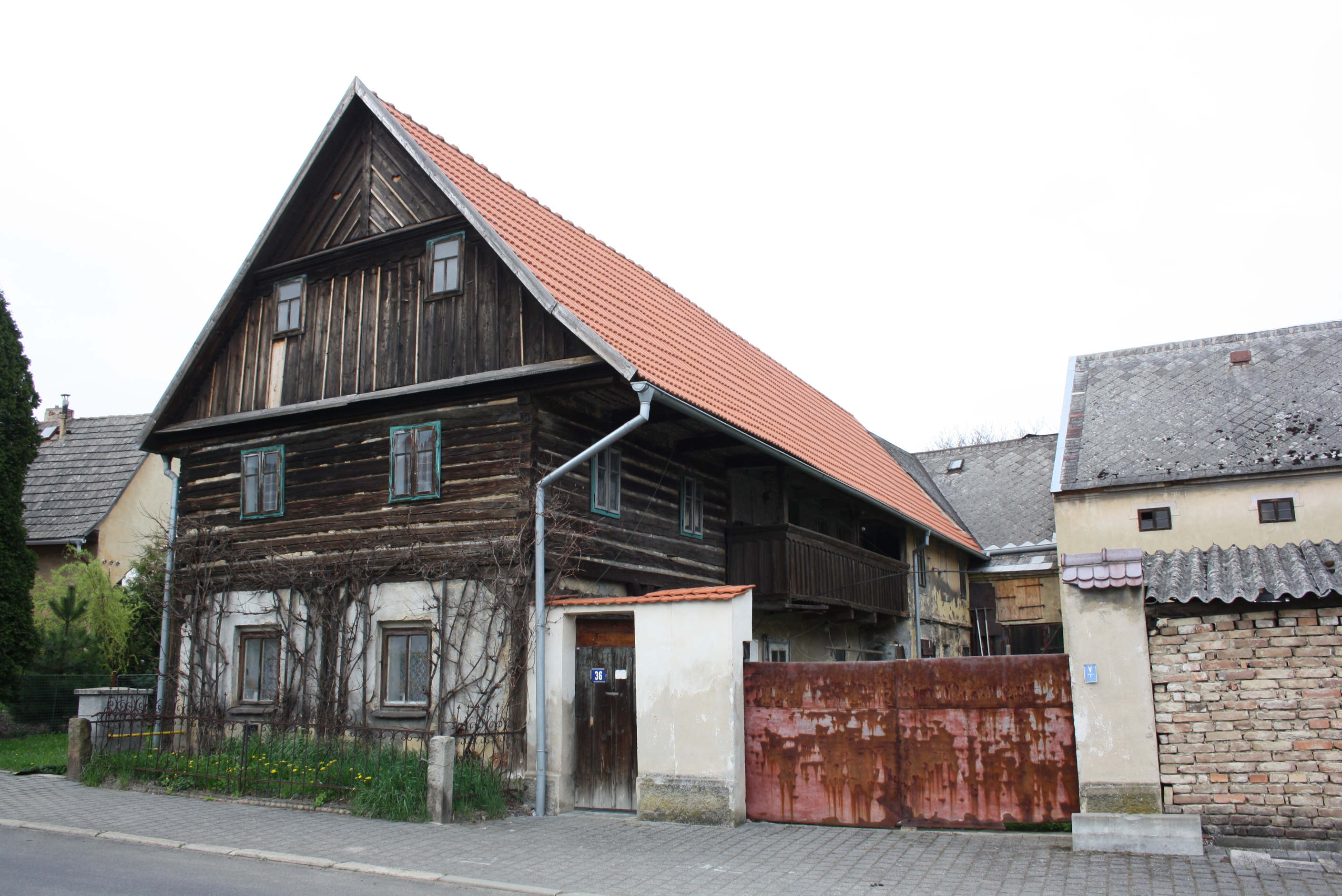 Dům číslo popisné 36 v Chodiněvsi.